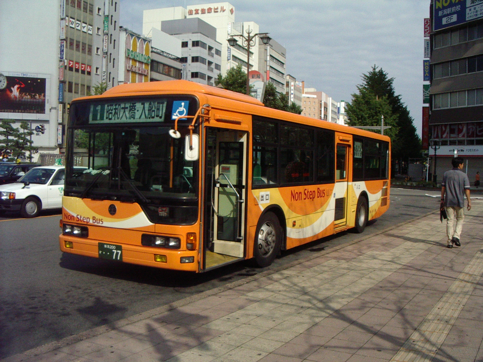 新潟交通ノンステップバス。新潟駅で撮影。